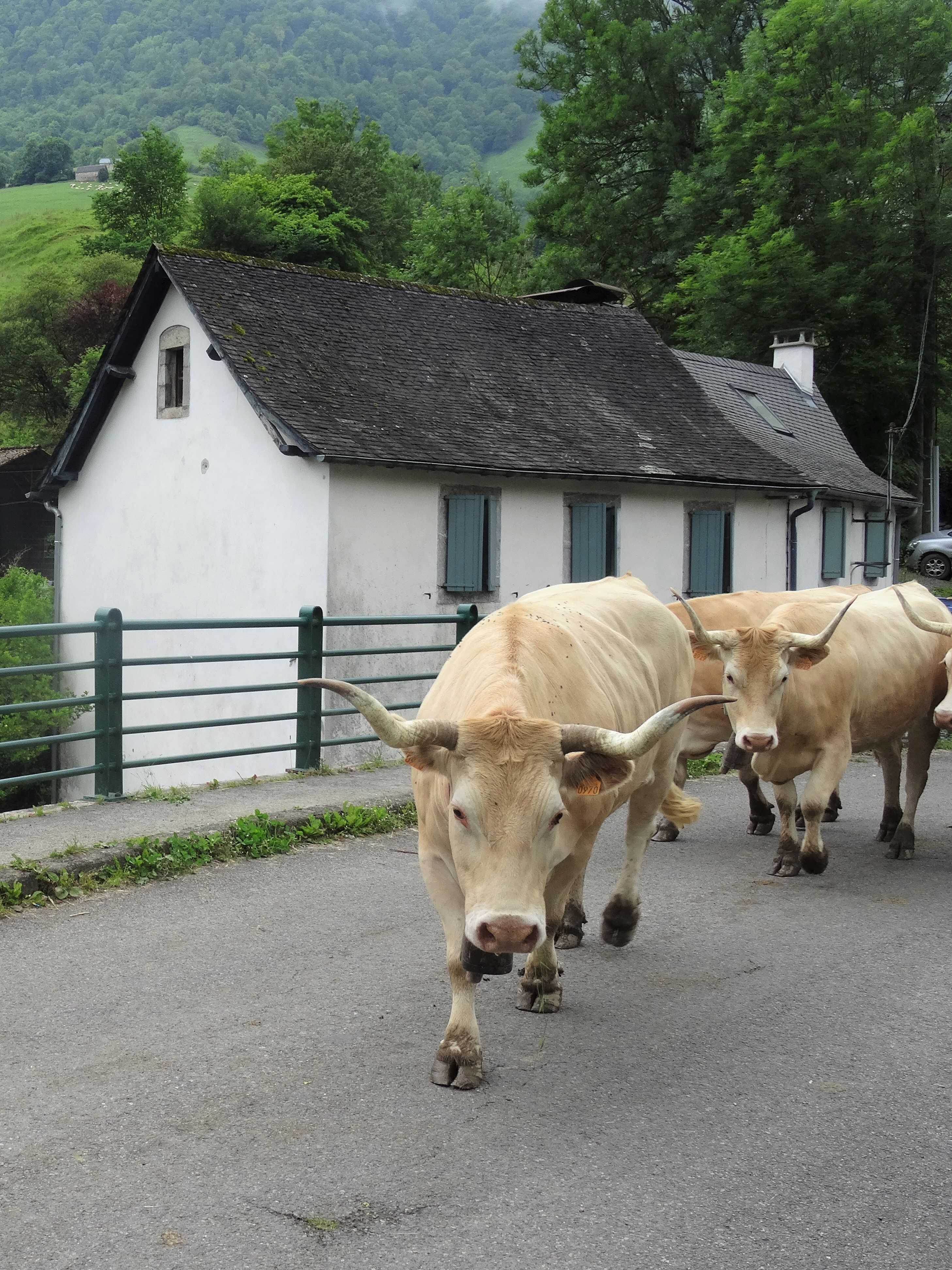 Vaches béarnaises à Lourdios-Ichère